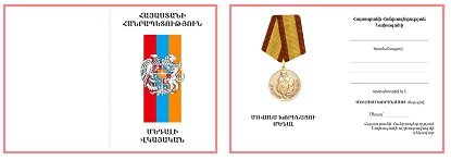 Մովսես Խորենացու մեդալի վկայական